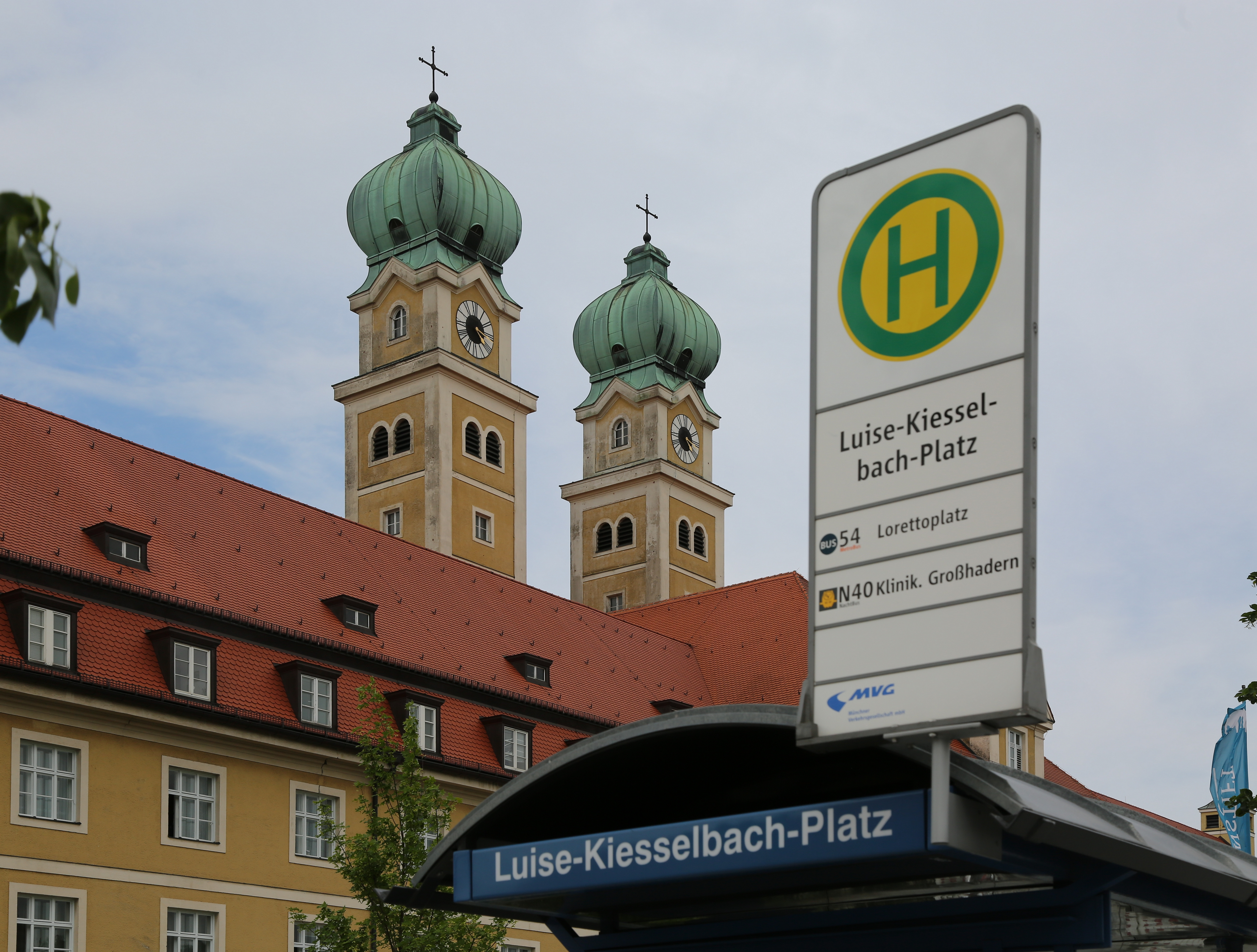 Altenheim St. Joseph, Luise-Kisselbach-Platz, im Münchner Stadtbezirk Sendling-Westpark